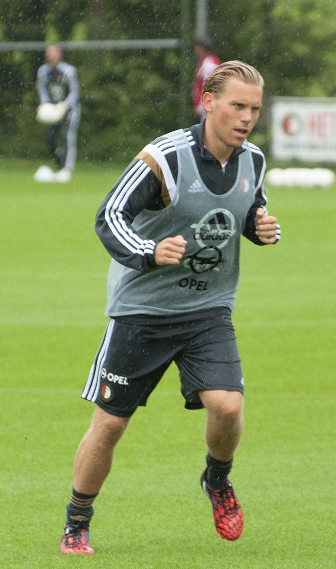 Ruud Vormer during Feyenoord training